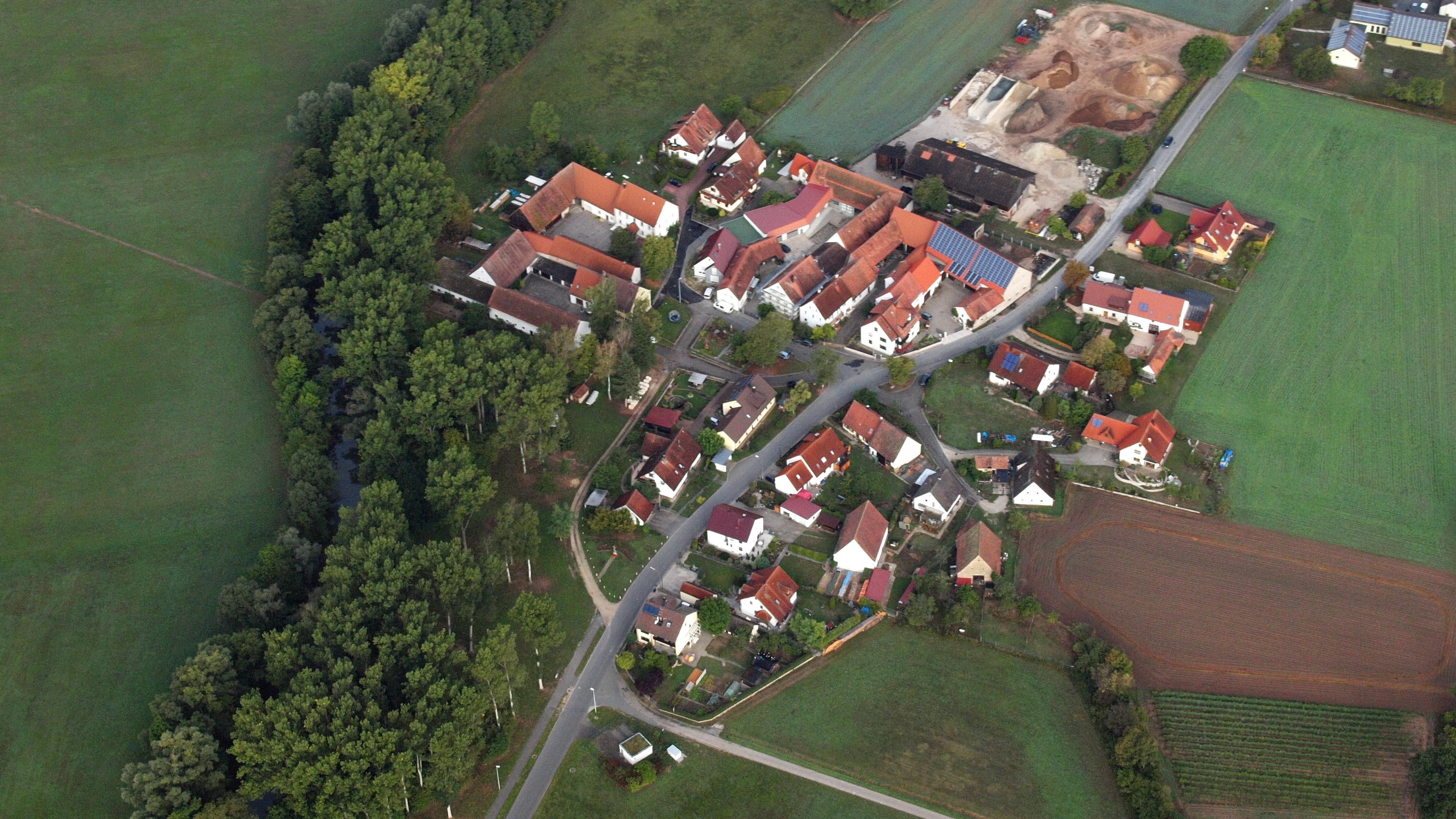 Adelsdorf-Uttstadt, Luftaufnahme (2015)